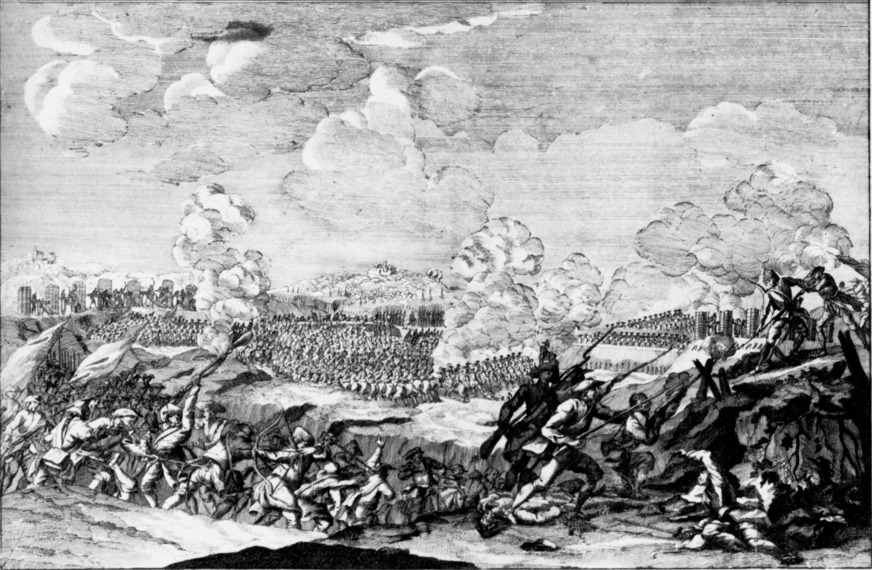 Битва при Гросс-Егерсдорфе